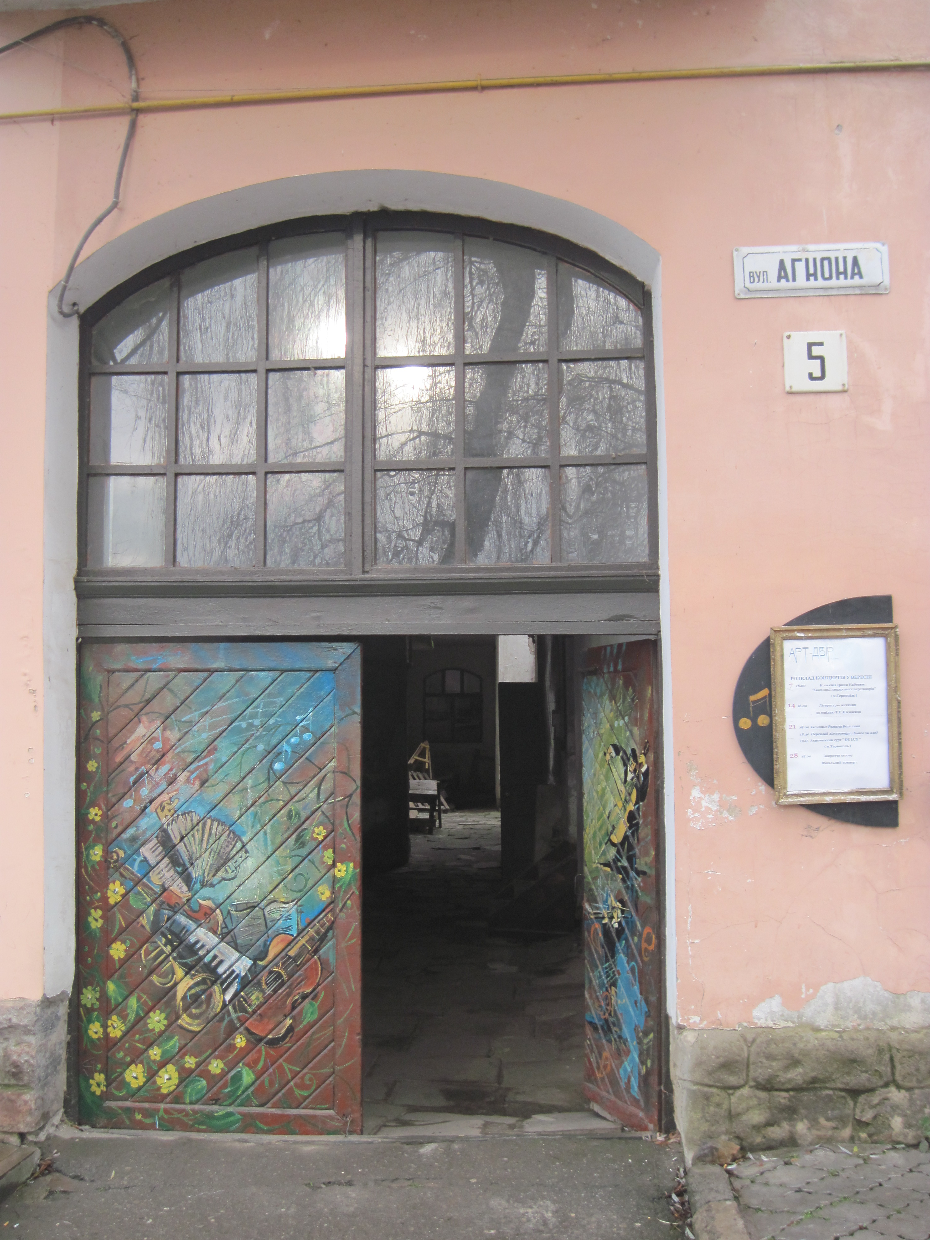 Бучач, вхід до АРТ-двору